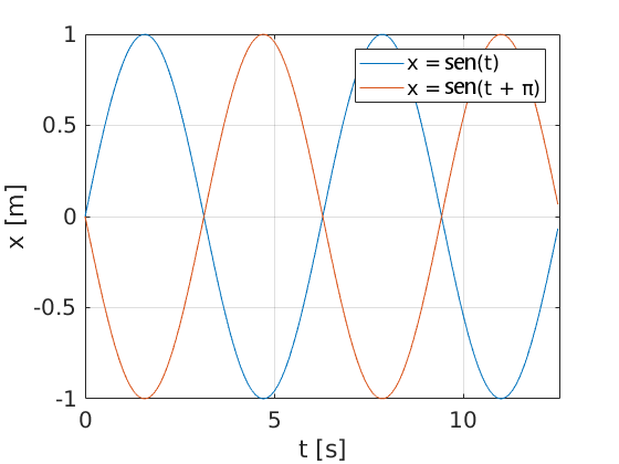 Osciladores simples con distinta fase e igual frecuencia